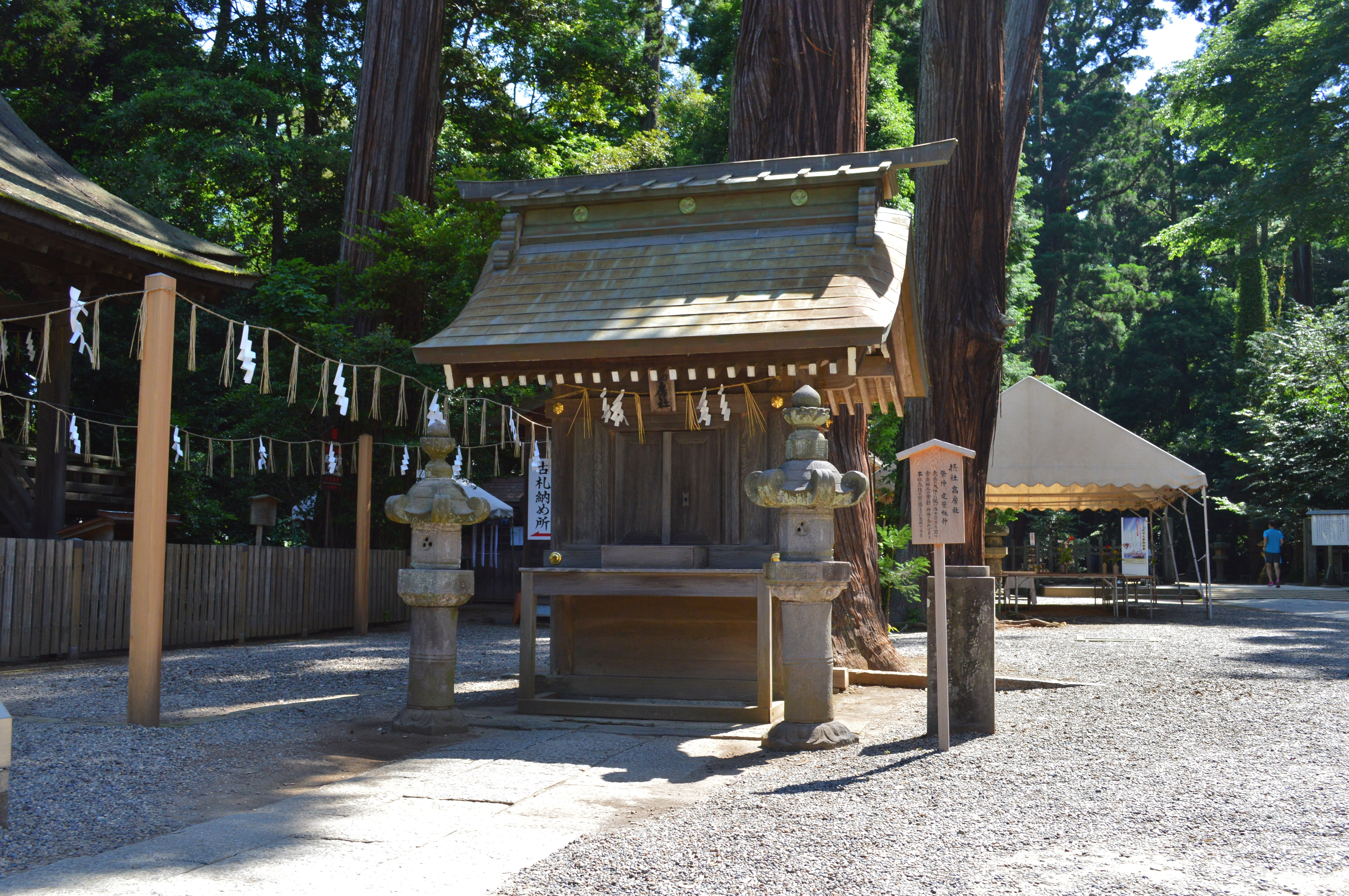 鹿島神宮境内摂社 高房社